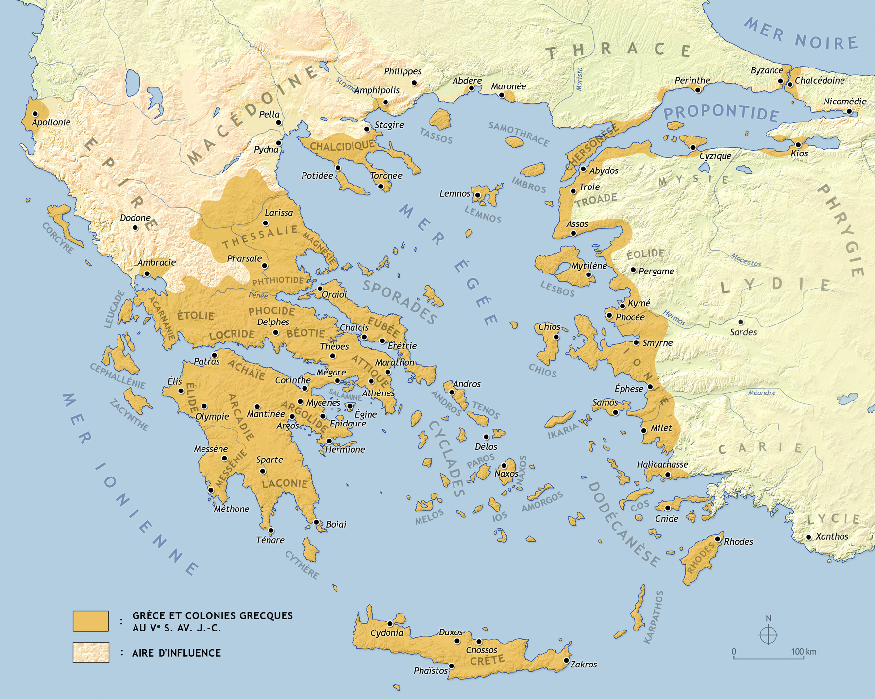 Carte de la Grèce antique au Ve siècle av. J.-C.